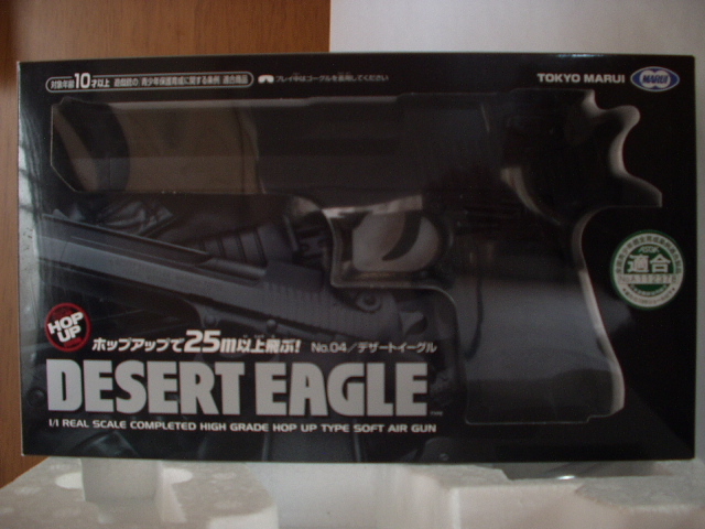 改正された銃砲刀剣類所持等取締法･全国青少年健全育成条例の適合を表すASGK新シール(箱の右端)ASGK(日本遊戯銃協同組合)に加盟しているメーカーの対象年齢10歳以上のエアソフトガンに貼られている。なお、シールは緑と青の2種類が存在し、物によって貼られているシールの色が異なる。